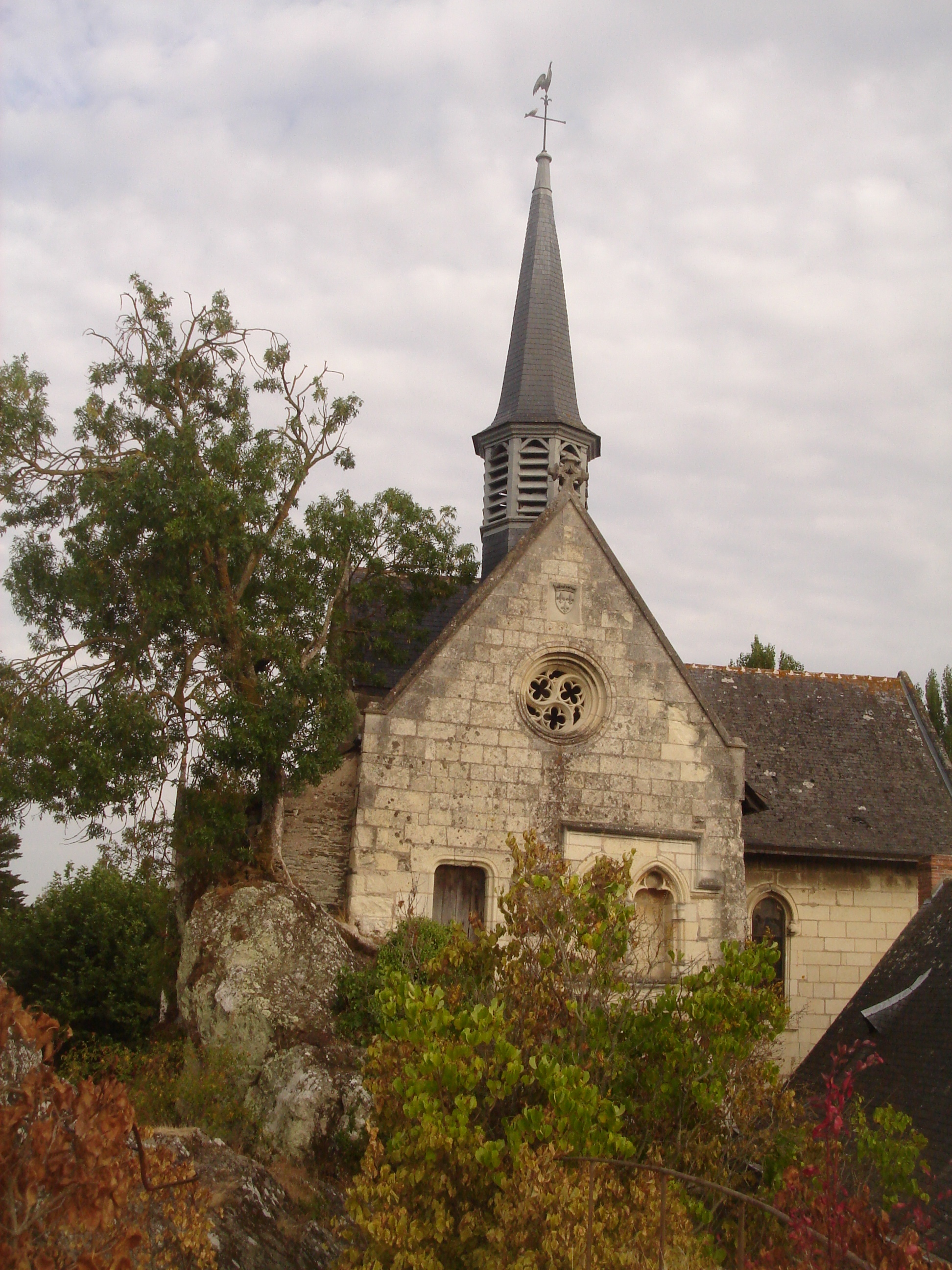 Église Notre-Dame de Béhuard, Maine-et-Loire, Pays de la Loire, France